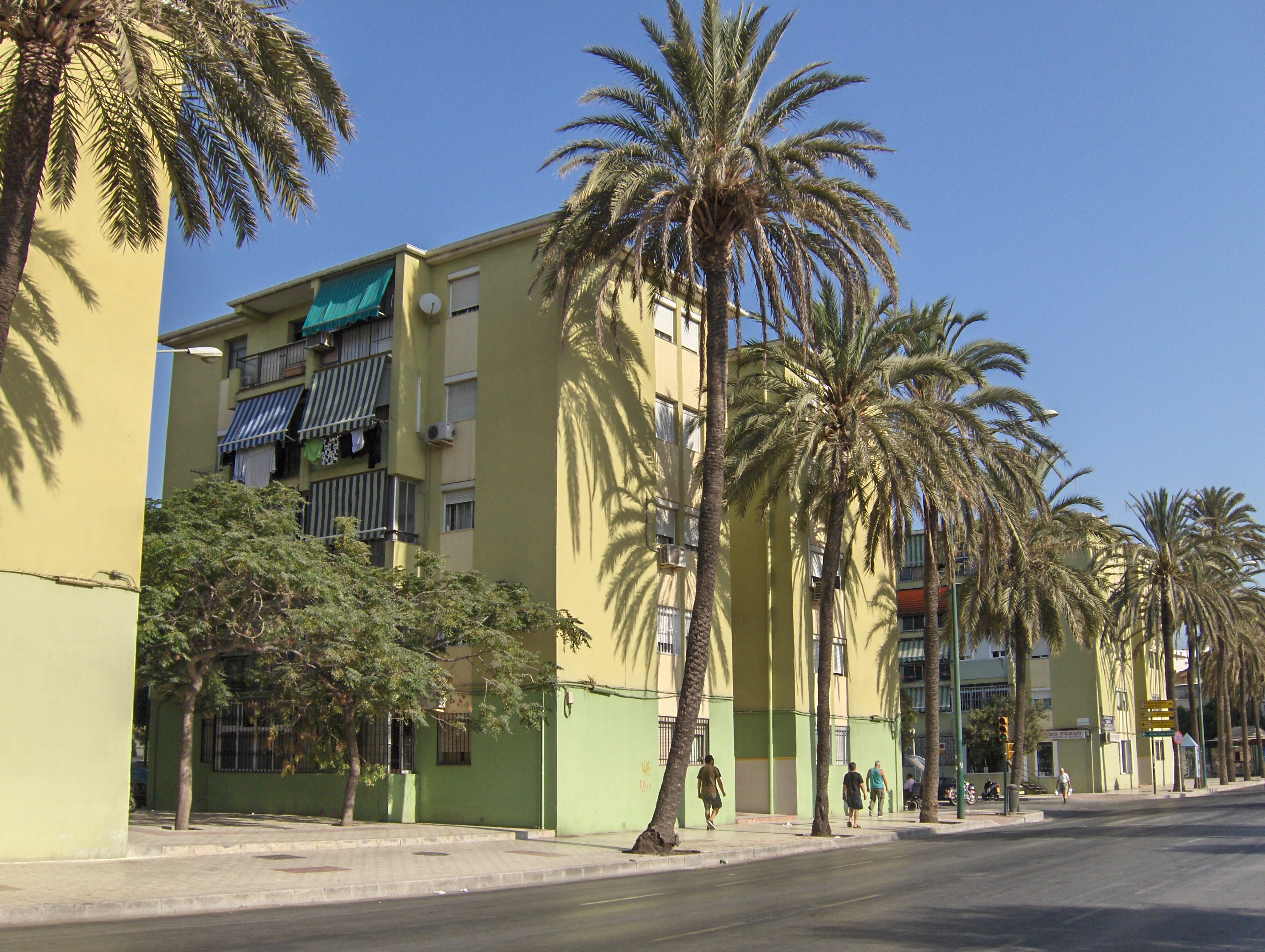 Vista del barrio de 25 Años de Paz, Málaga, España.